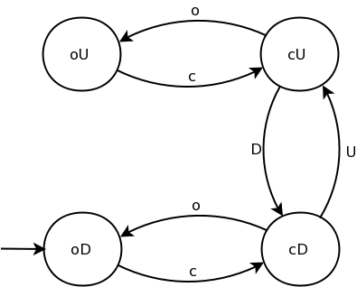 finite state automaton example - simple lift model